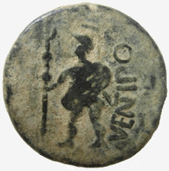 Una de las monedas encontradas en Casariche de la antigua ciudad de Ventippo.